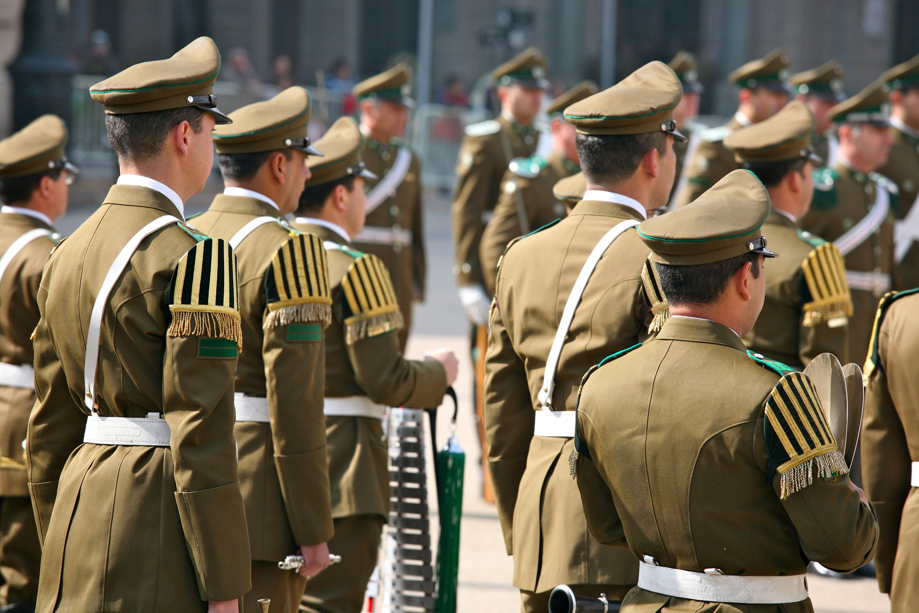 Santiago, Chile